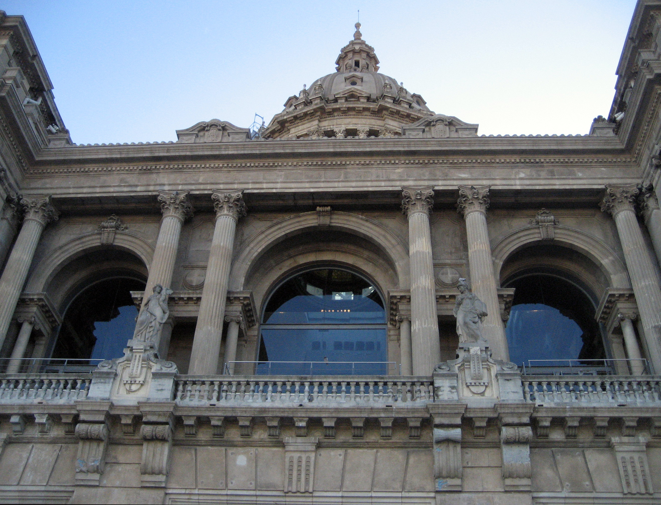 Parte central de la planta principal de la fachada del Palacio Nacional de Barcelona, Cataluña. Spain